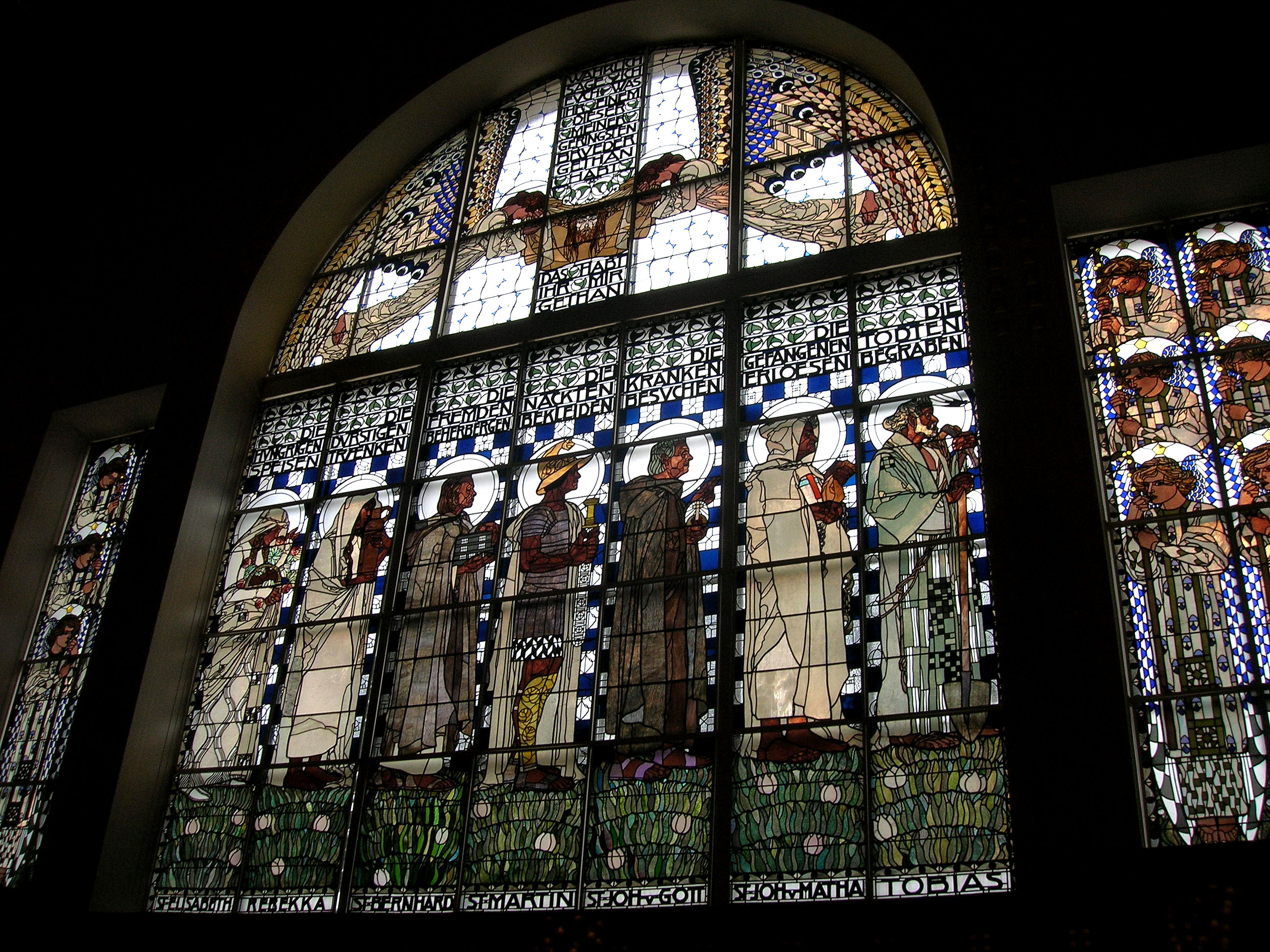 de: Kirche am Steinhof in Wienen: Steinhoch church in Vienna